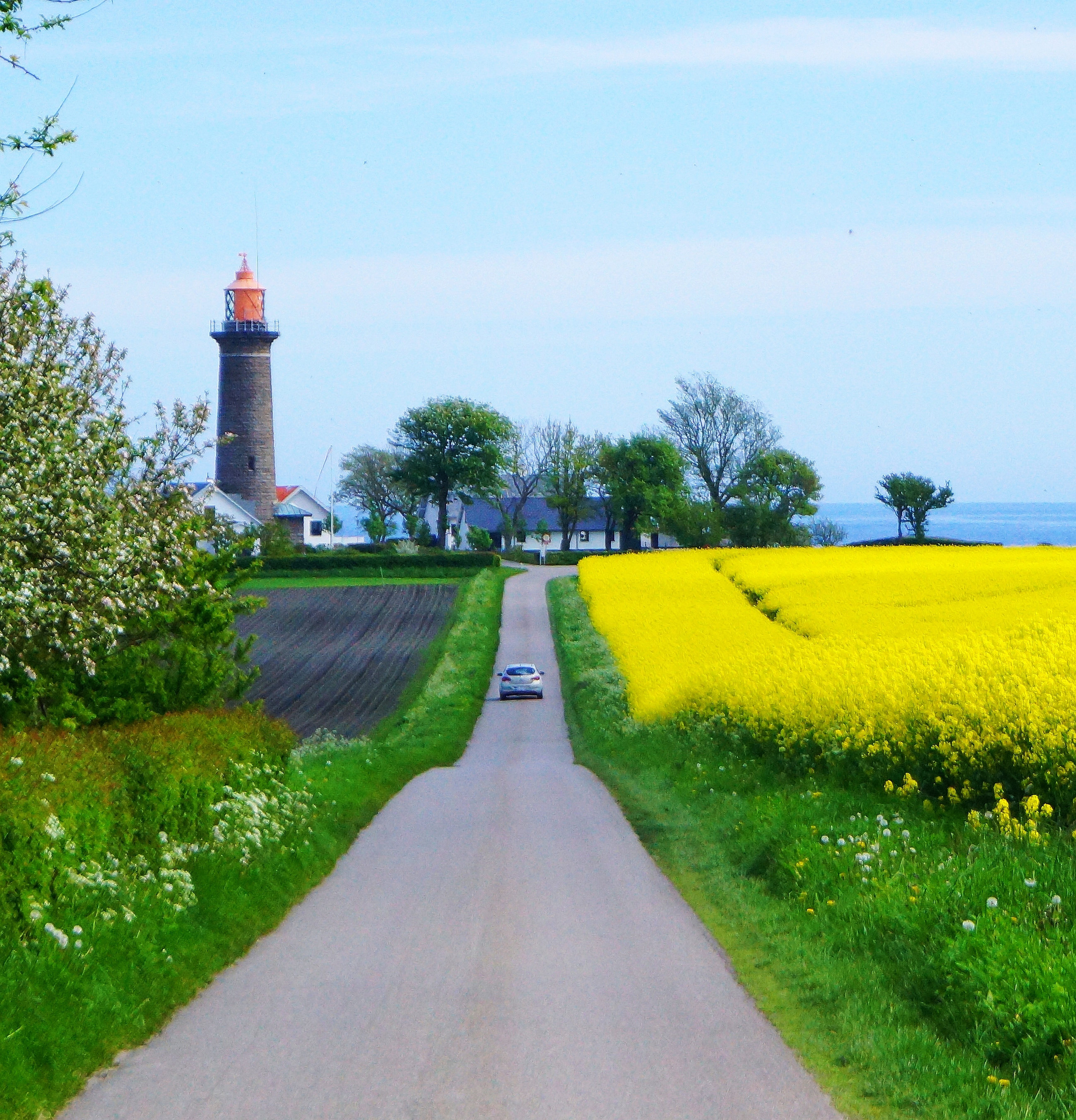 Fornæs Fyr, nord f. Grenå, Djursland